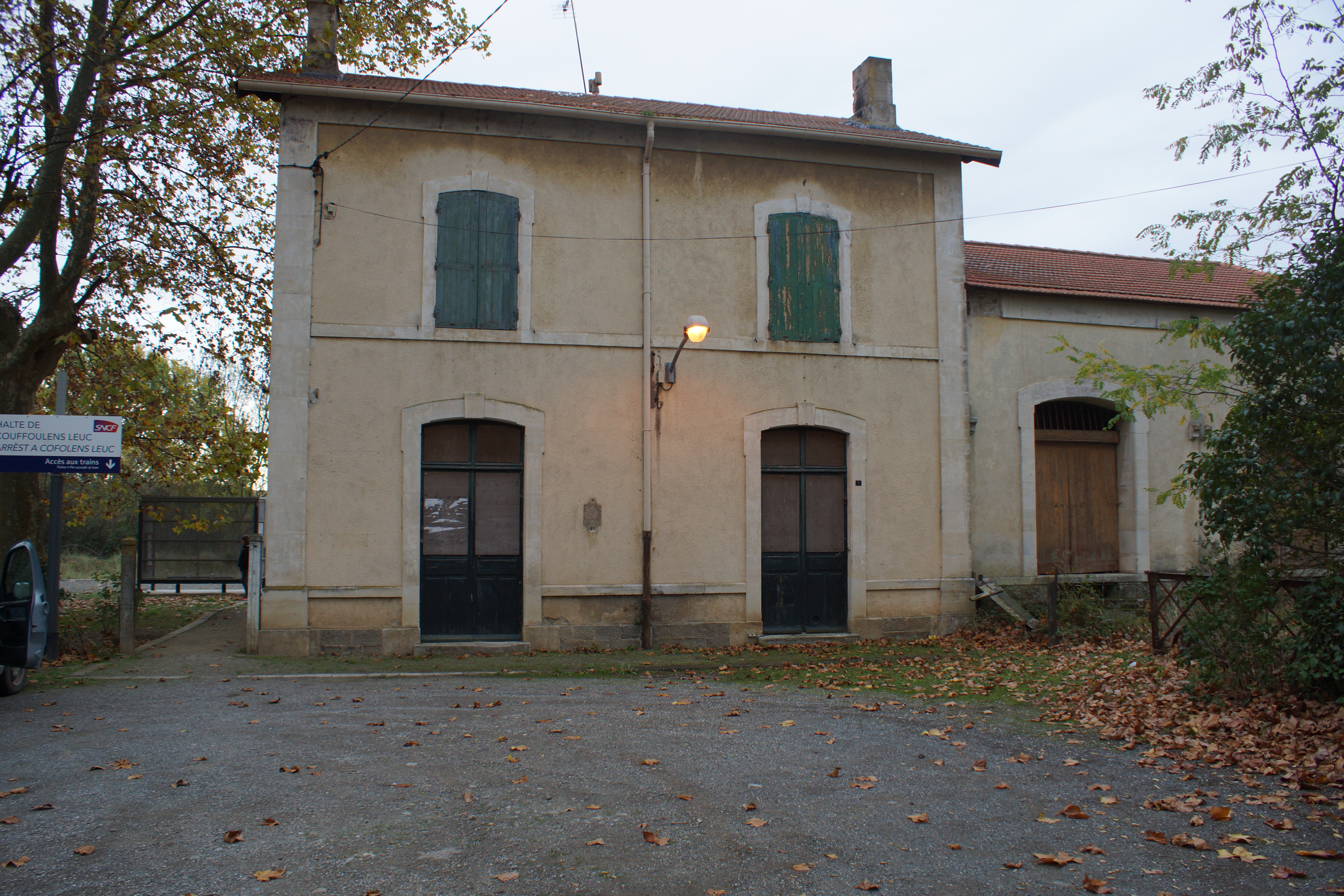 Gare de de Couffoulens - Leuc : l'ancien bâtiment voyageurs et l'entrée de la halte à gauche.